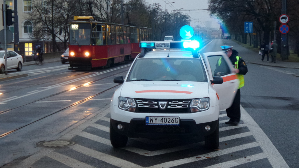 Dacia Duster w barwach Nadzoru Ruchu TW w Warszawie